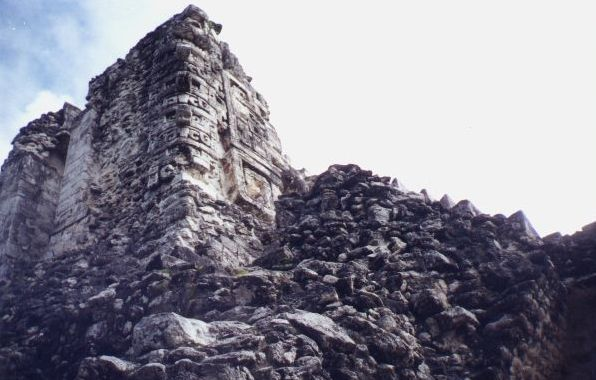 Chicanna, sitio arqueológico maya en el estado de Campeche, México.